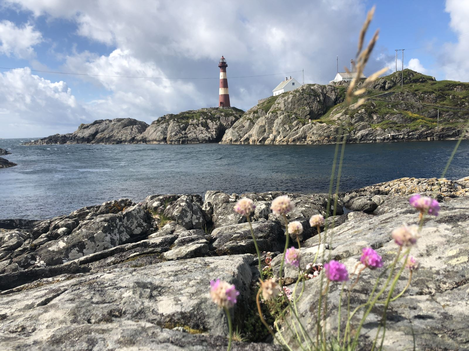 Hellisøy fyr og Fyrsundet.